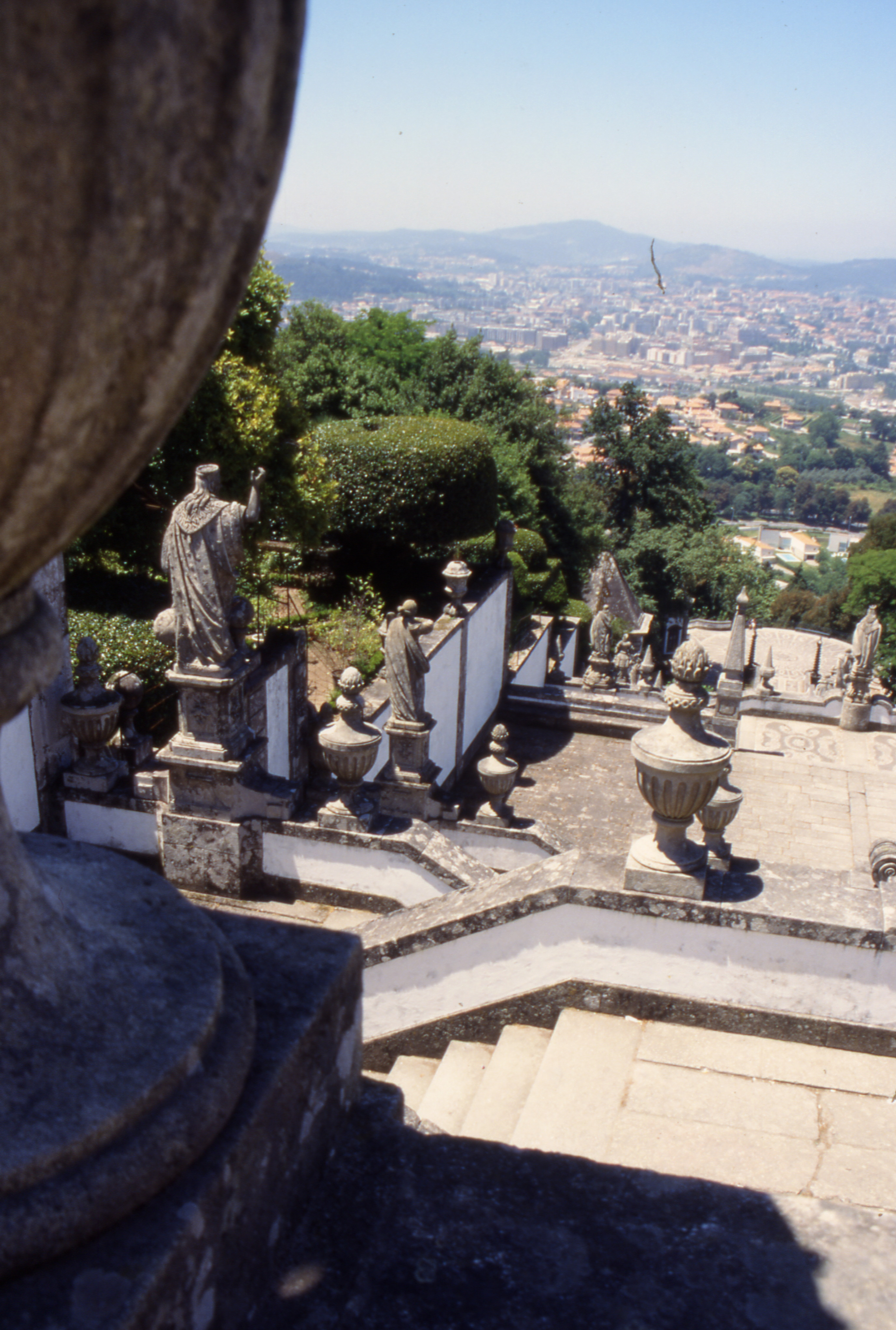 Braga Bom Jesus do Monte ViaSacra